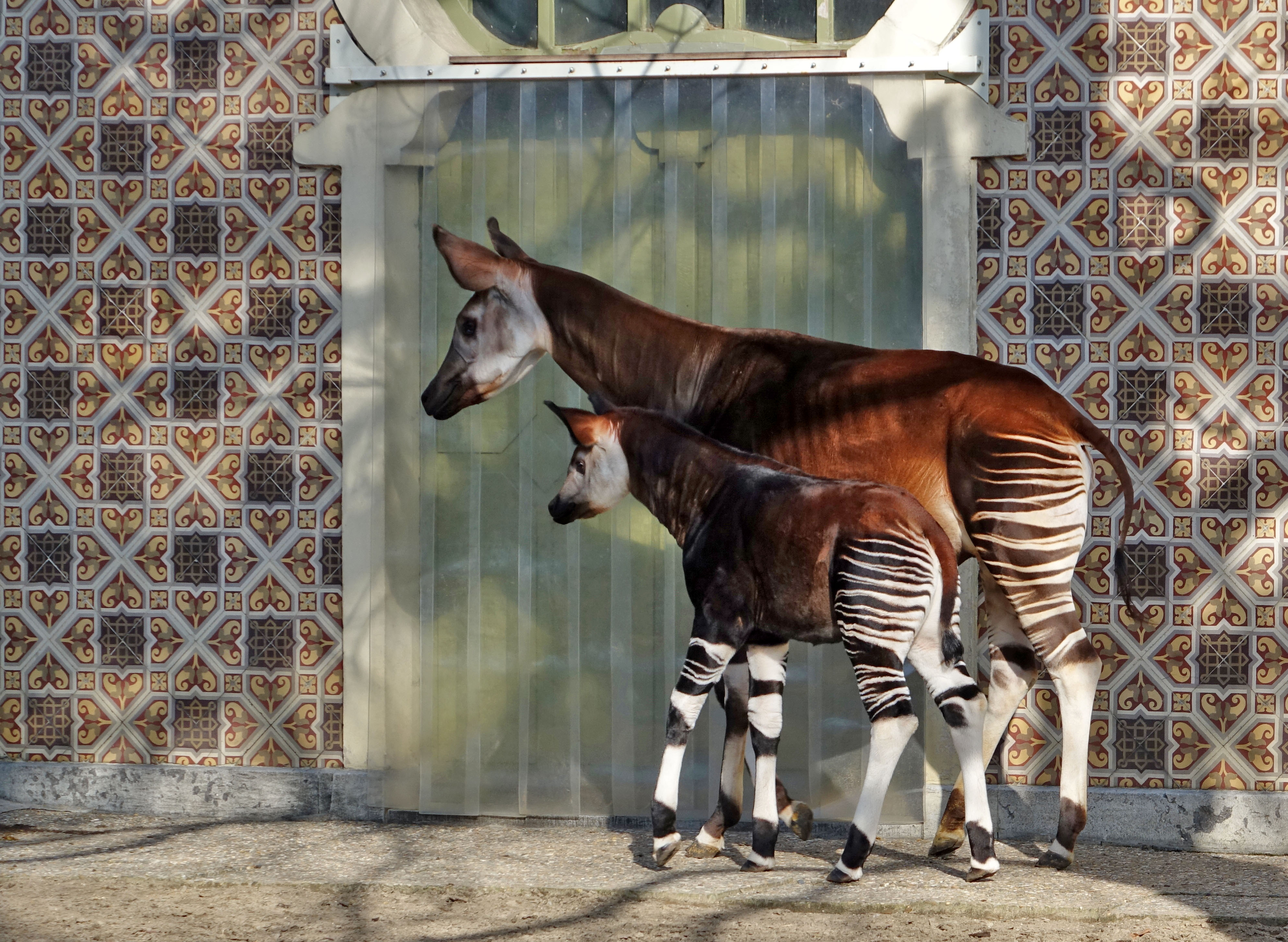 Okapi and son